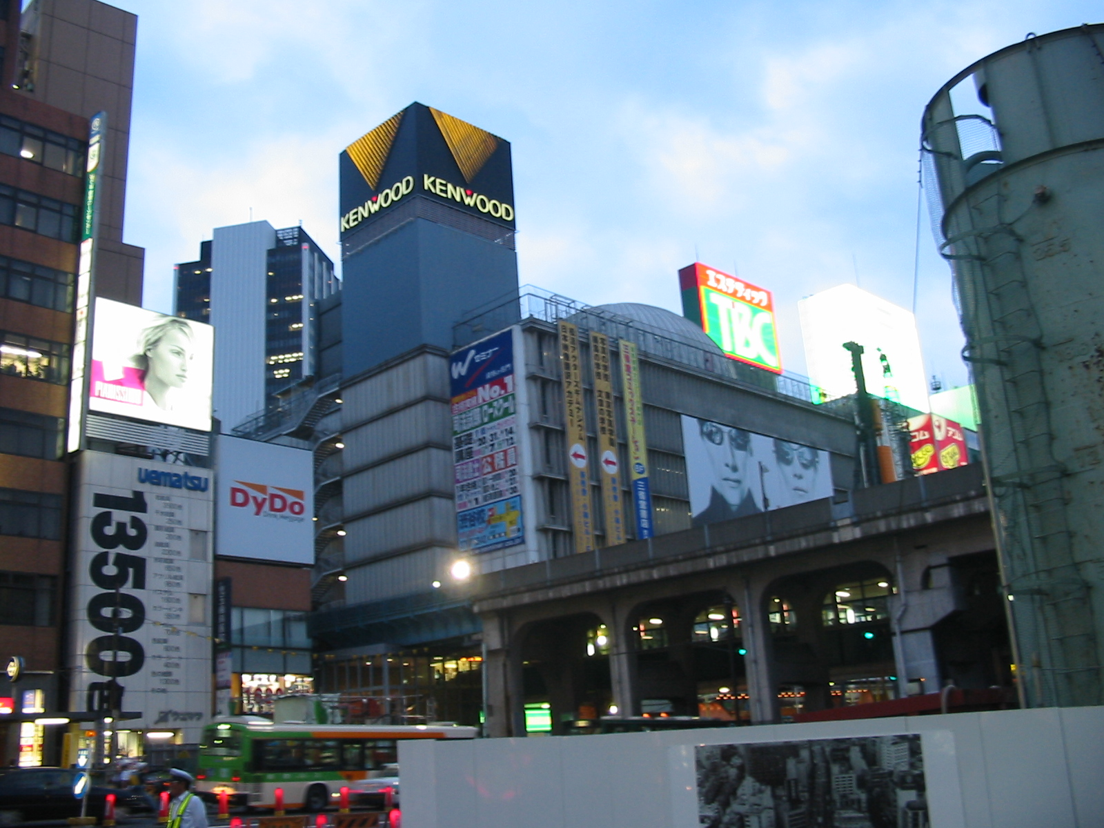 Tokyu Bunka Kaikan, Shibuya, Tokyo, Japan